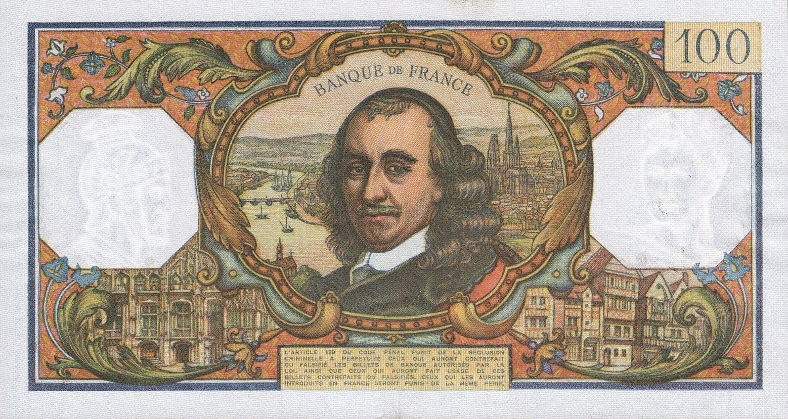 100 francia frank 1966.06.02. Corneille-típus, hátoldal.